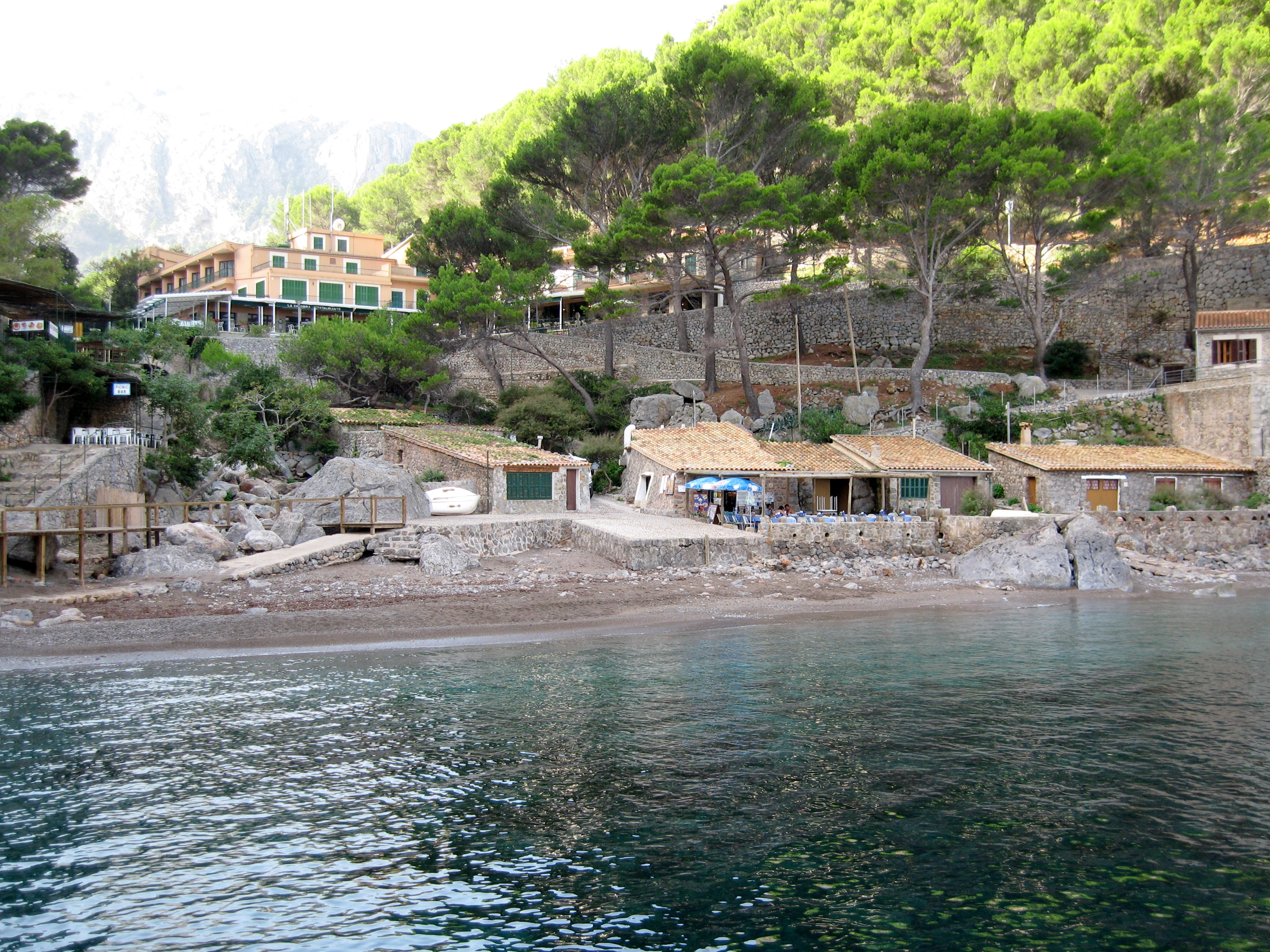 Platja de sa Calobra („Strand von Sa Calobra“), Gemeinde Escorca, Mallorca, Spanien